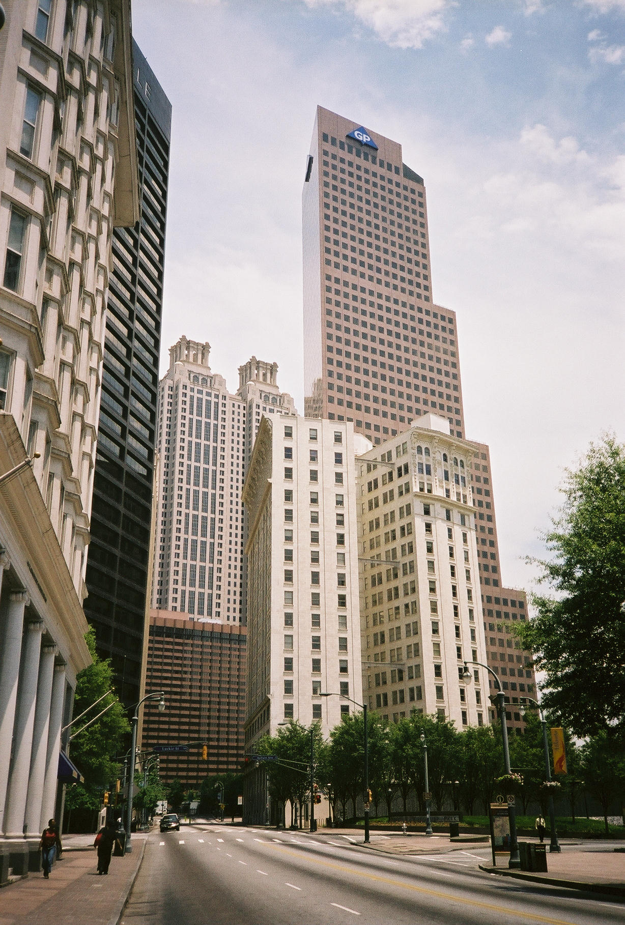 FC Georgio (2004) Photo réutilisable avec mention de l'auteur